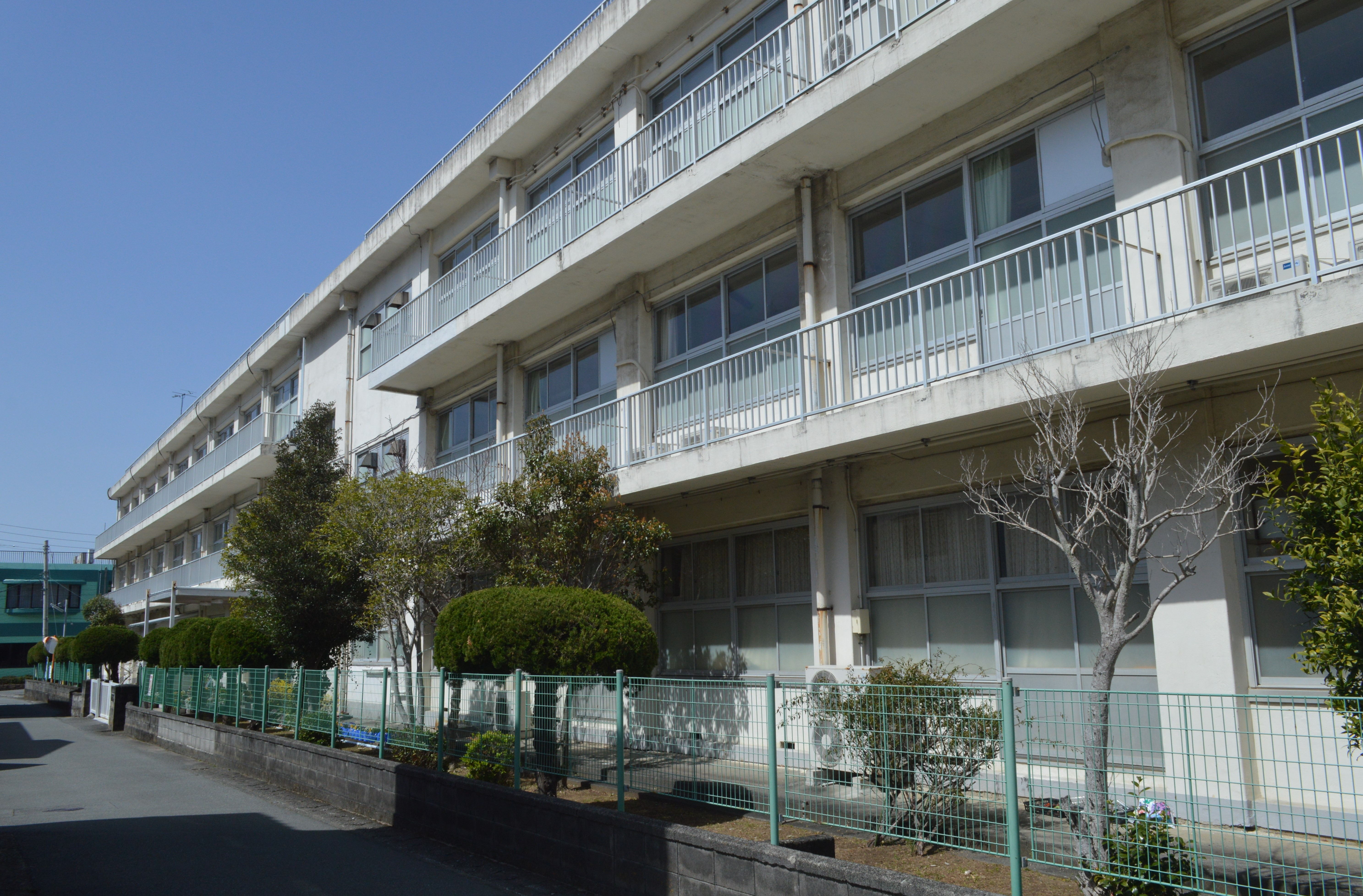 静岡県沼津市戸田にある沼津市立戸田中学校。